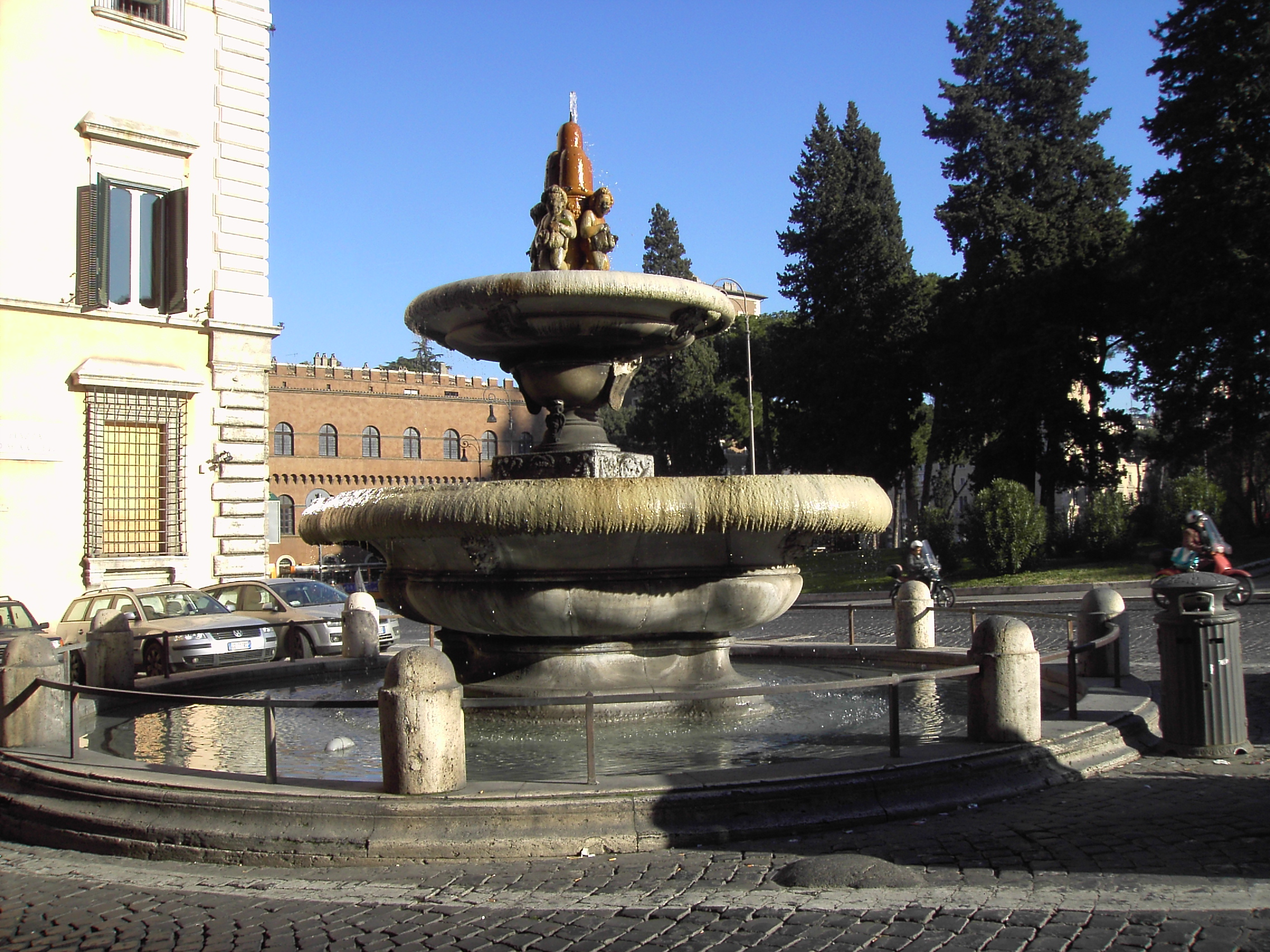 Roma, piazza d'Aracoeli: fontana di Sisto V (Giacomo della Porta, 1589). L'emblema dei 3 monti, al culmine, è di Clemente XI Albani (1700). La piazza è il punto di congiunzione di 3 rioni: Sant'Angelo a sinistra, Pigna dietro, Campitelli a destra